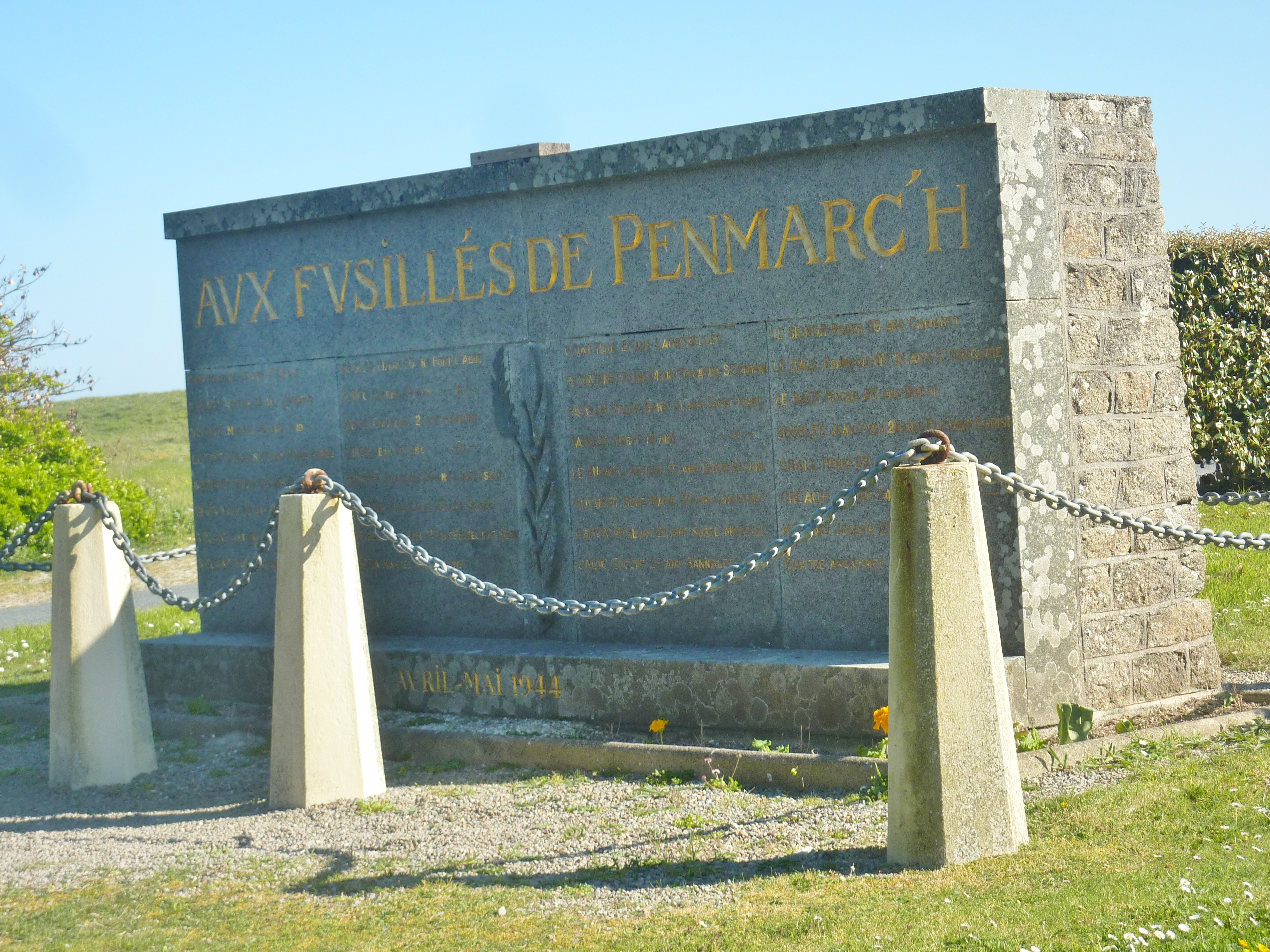 Le monument "Aux fusillés de Penmarch" sur la dune du Stêr Poulguen à Penmarch commémorant les 35 résistants fusillés à cet endroit en avril et mai 1944.